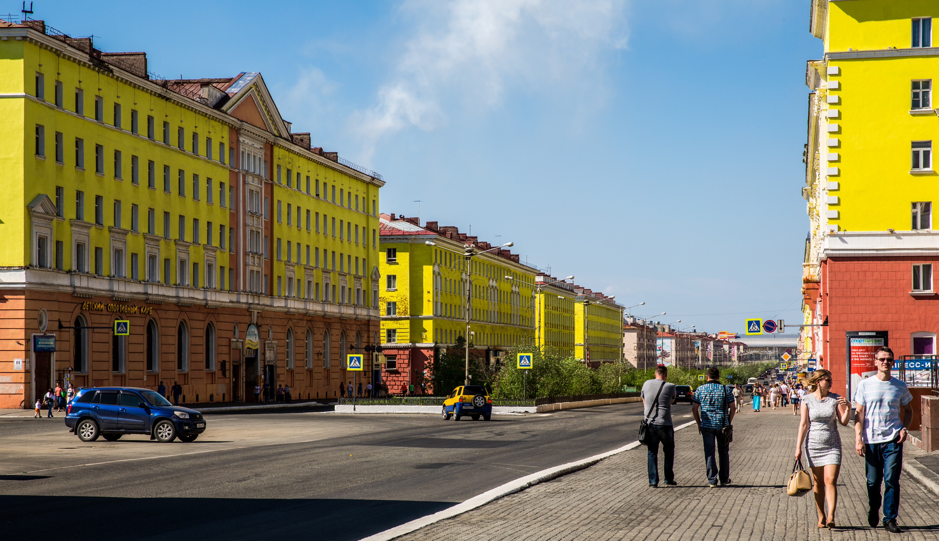 Ленинский проспект. Комплекс застройки центра города Норильска